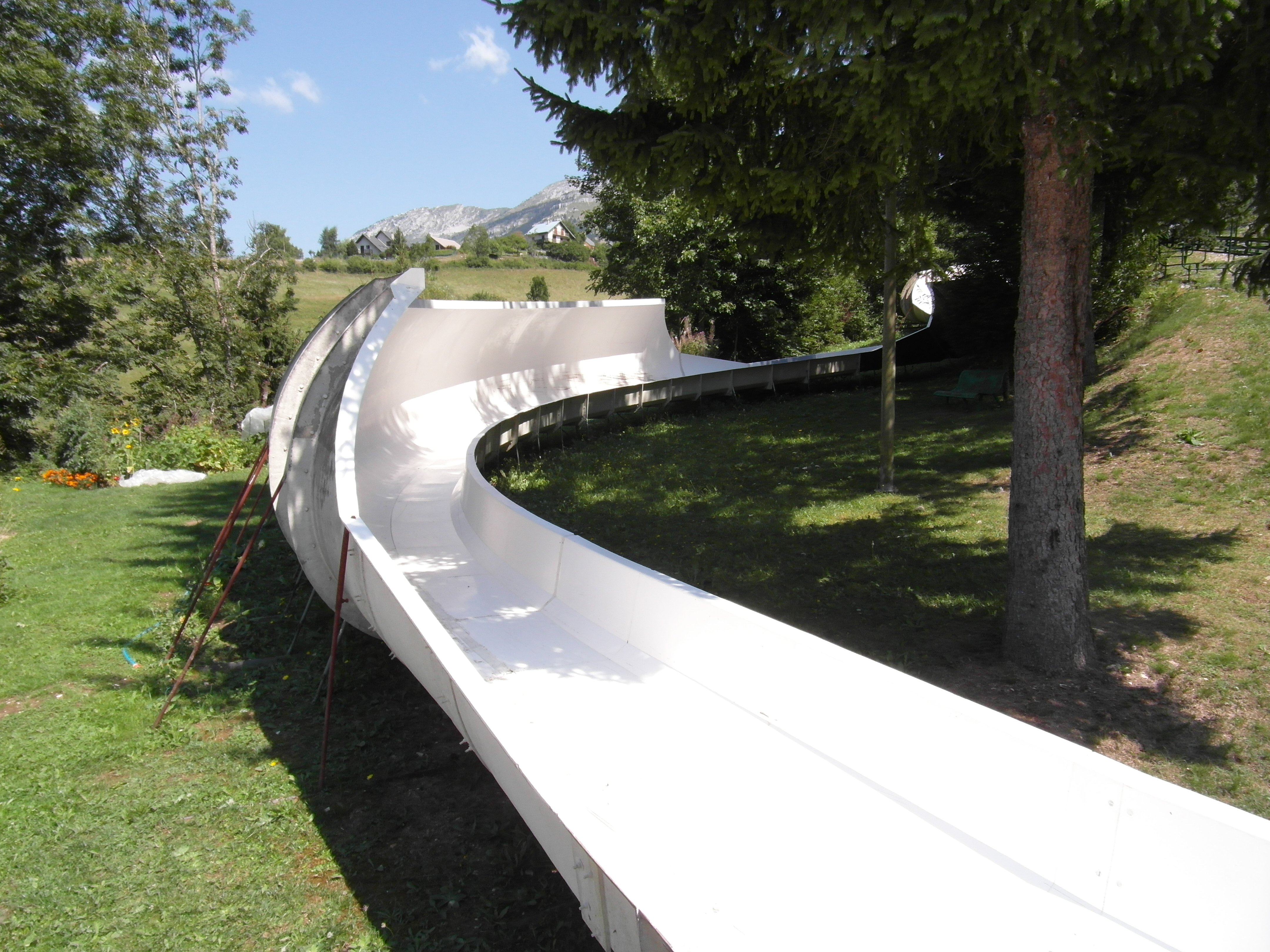 Piste de luge au ludi parc de Villard